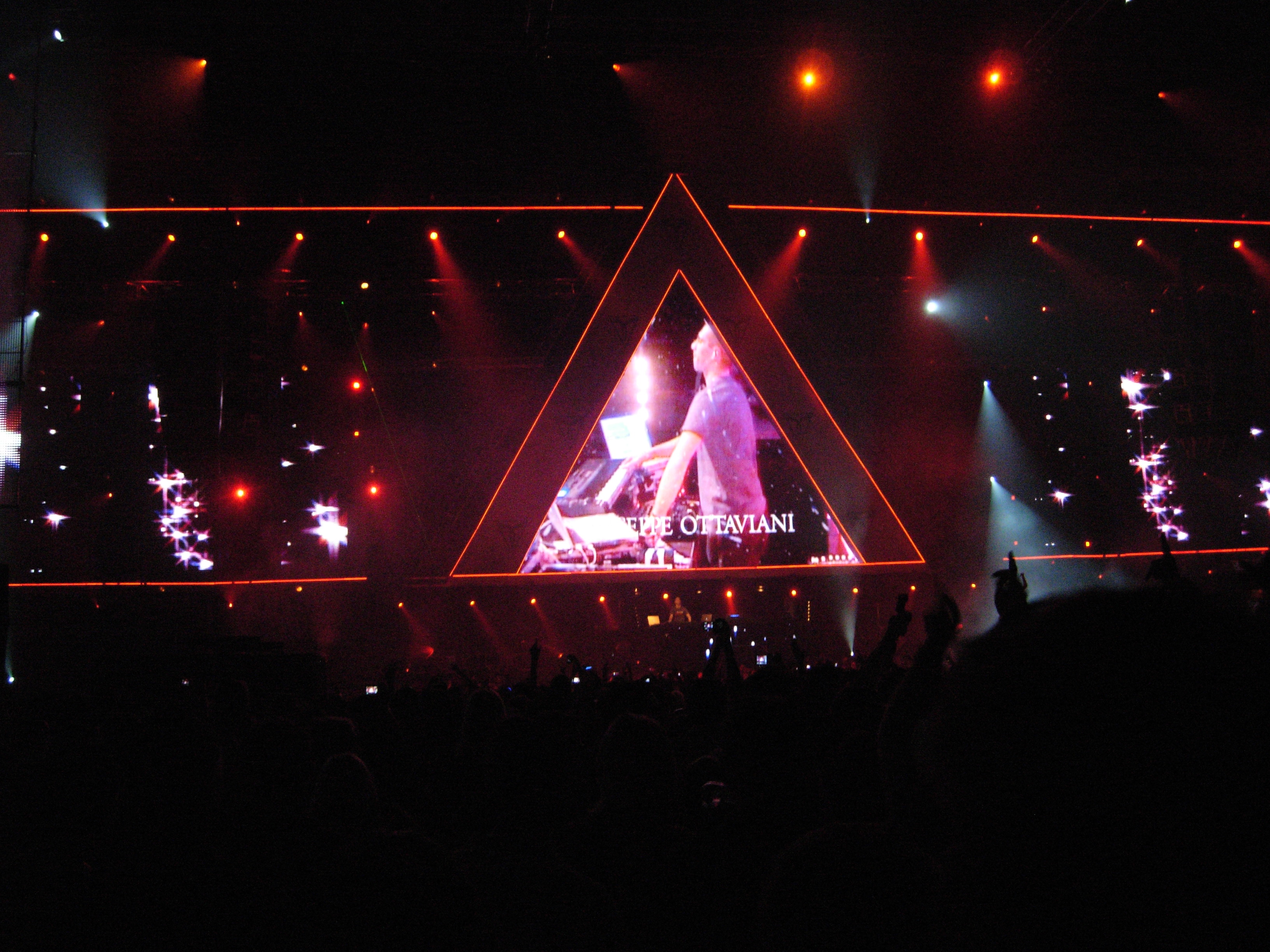 Transmission 2009 Praha - O2 Arena, hraje DJ Giuseppe Ottaviani